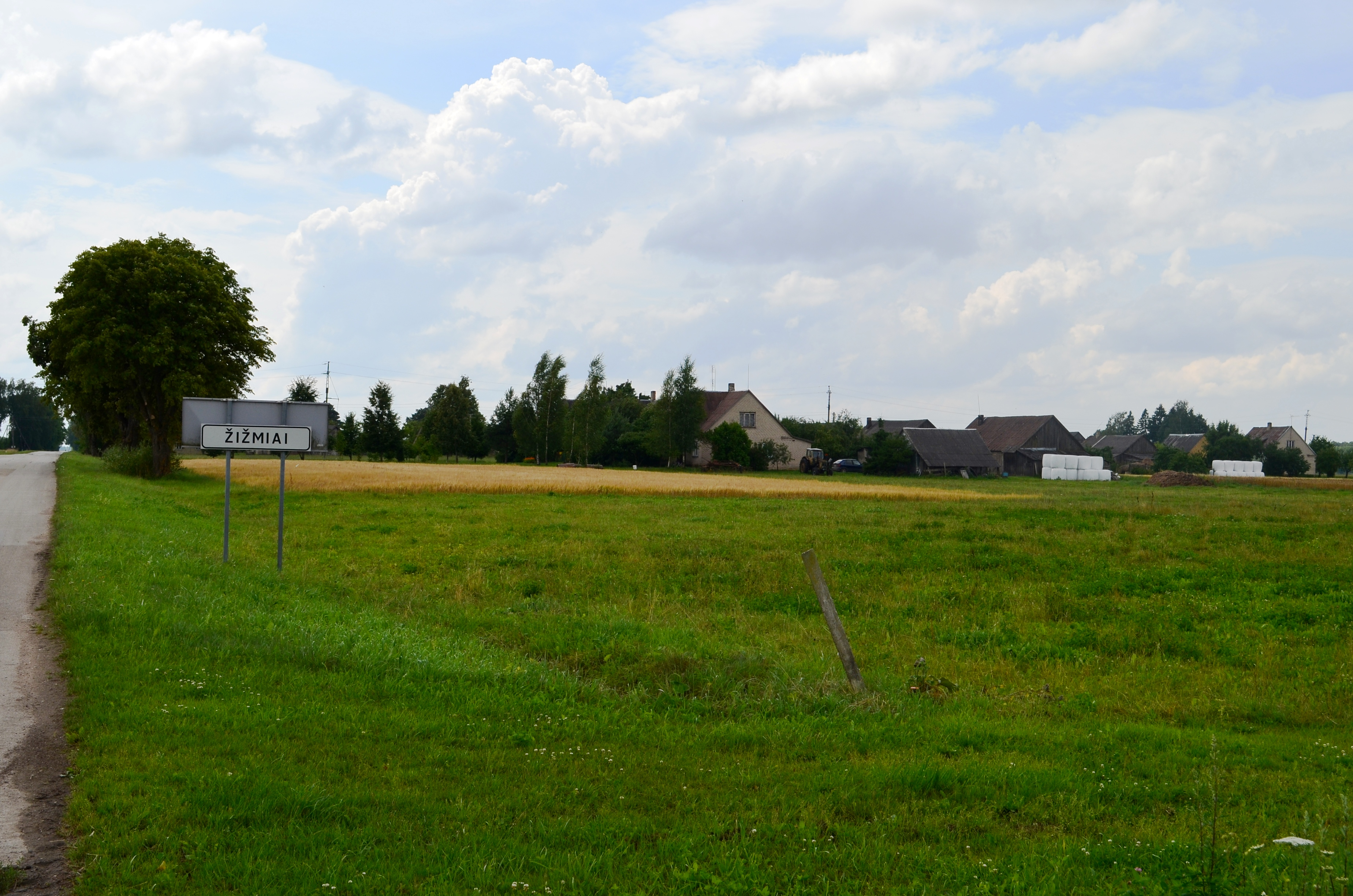 Žižmių k., Ramygalos sen., Panevėžio raj.